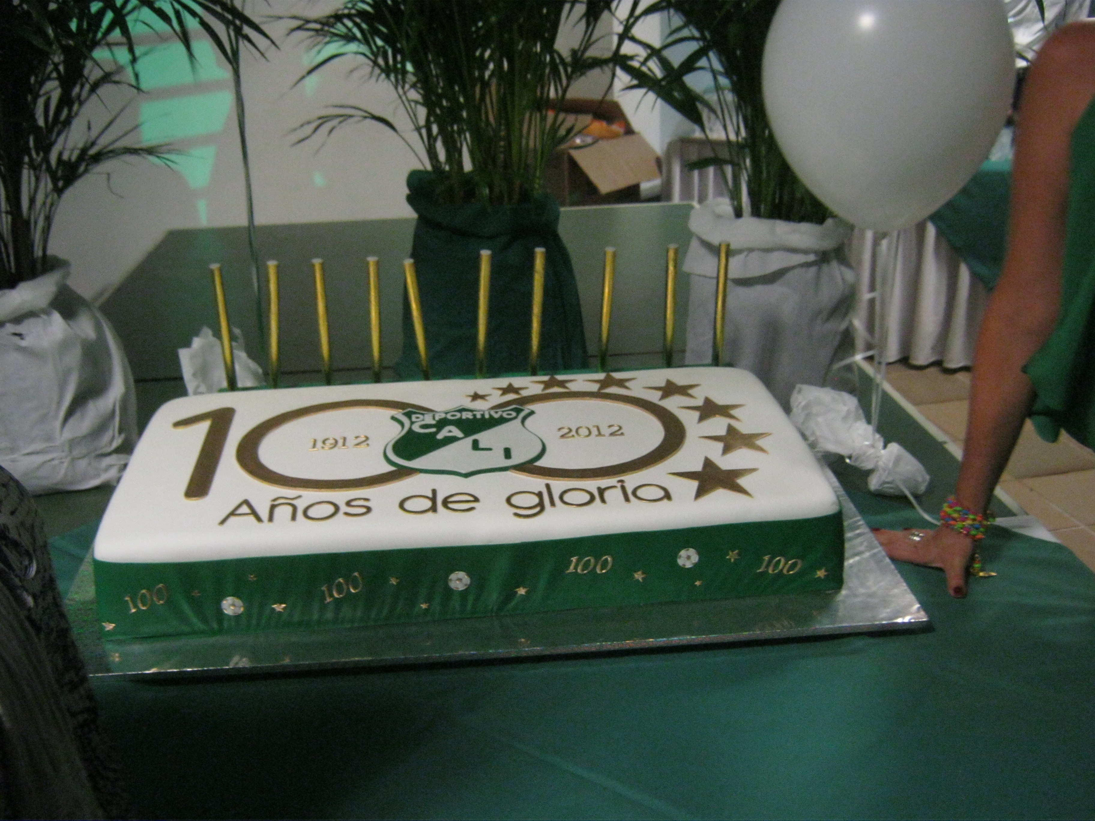 Festejo por los 100 años del Deportivo Cali